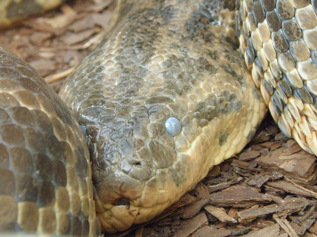 Anakonda żółta, anakonda paragwajska, anakonda południowa (Eunectes notaeus)